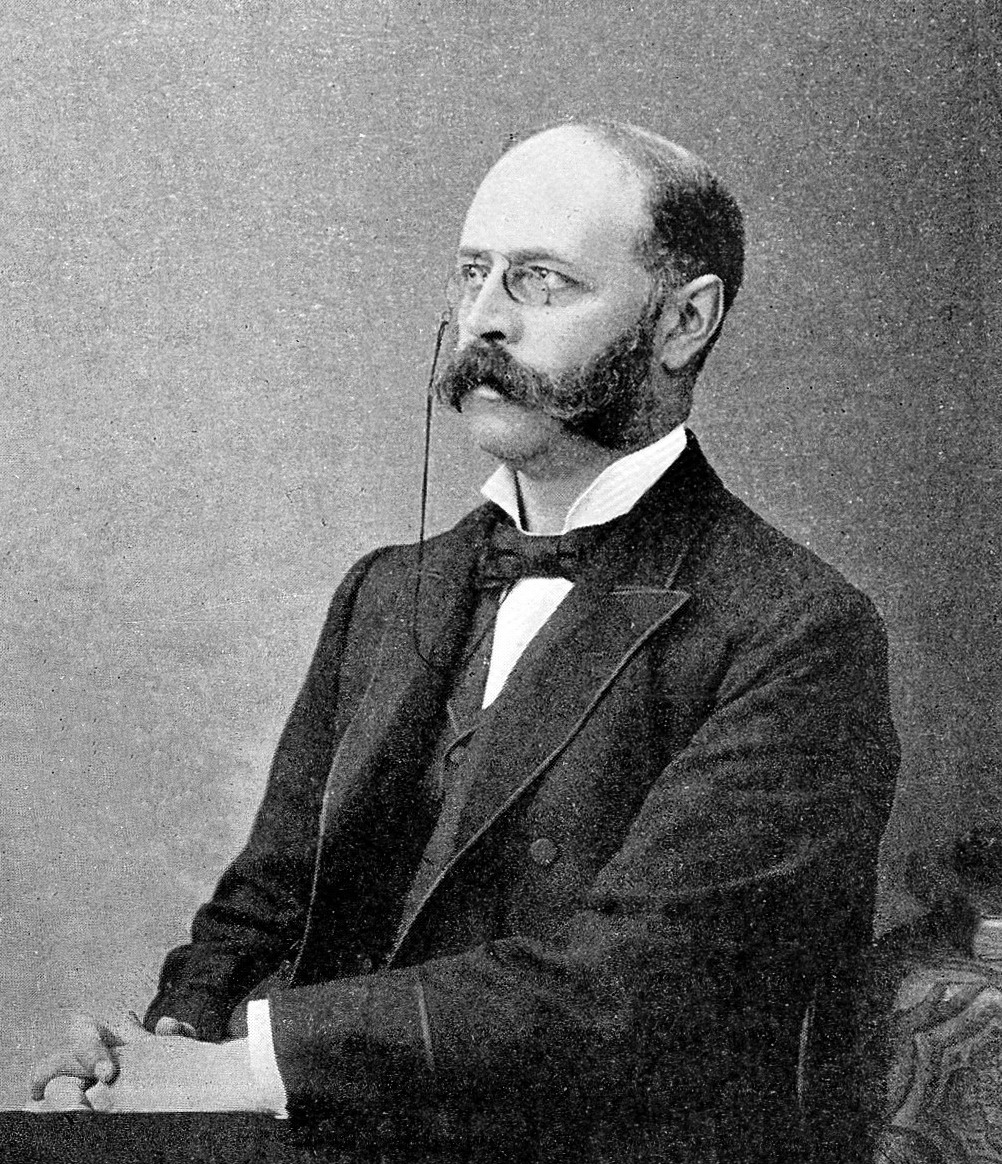 Sir James Reid